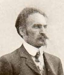 Émile Chapelier, né en 1870 et mort le 16 mars 1933 à Bruxelles, ouvrier mineur, autodidacte, écrivain prolifique et militant communiste libertaire. Figure centrale de l'anarchisme belge, il finit par adhérer au Parti Ouvrier Belge en 1908-1909 tous en défendant des positions d'extrême gauche inspirée du syndicalisme révolutionnaire français.